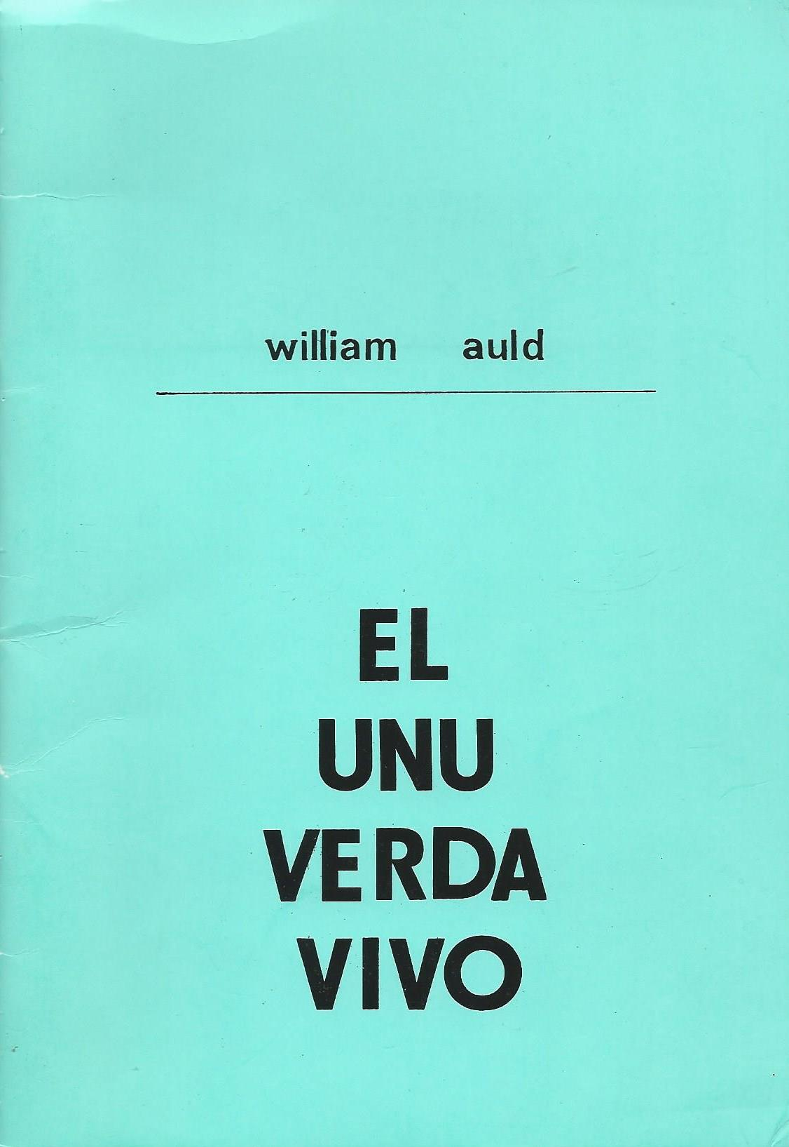 kovrilo de "El Unu Verda Vivo", 1978